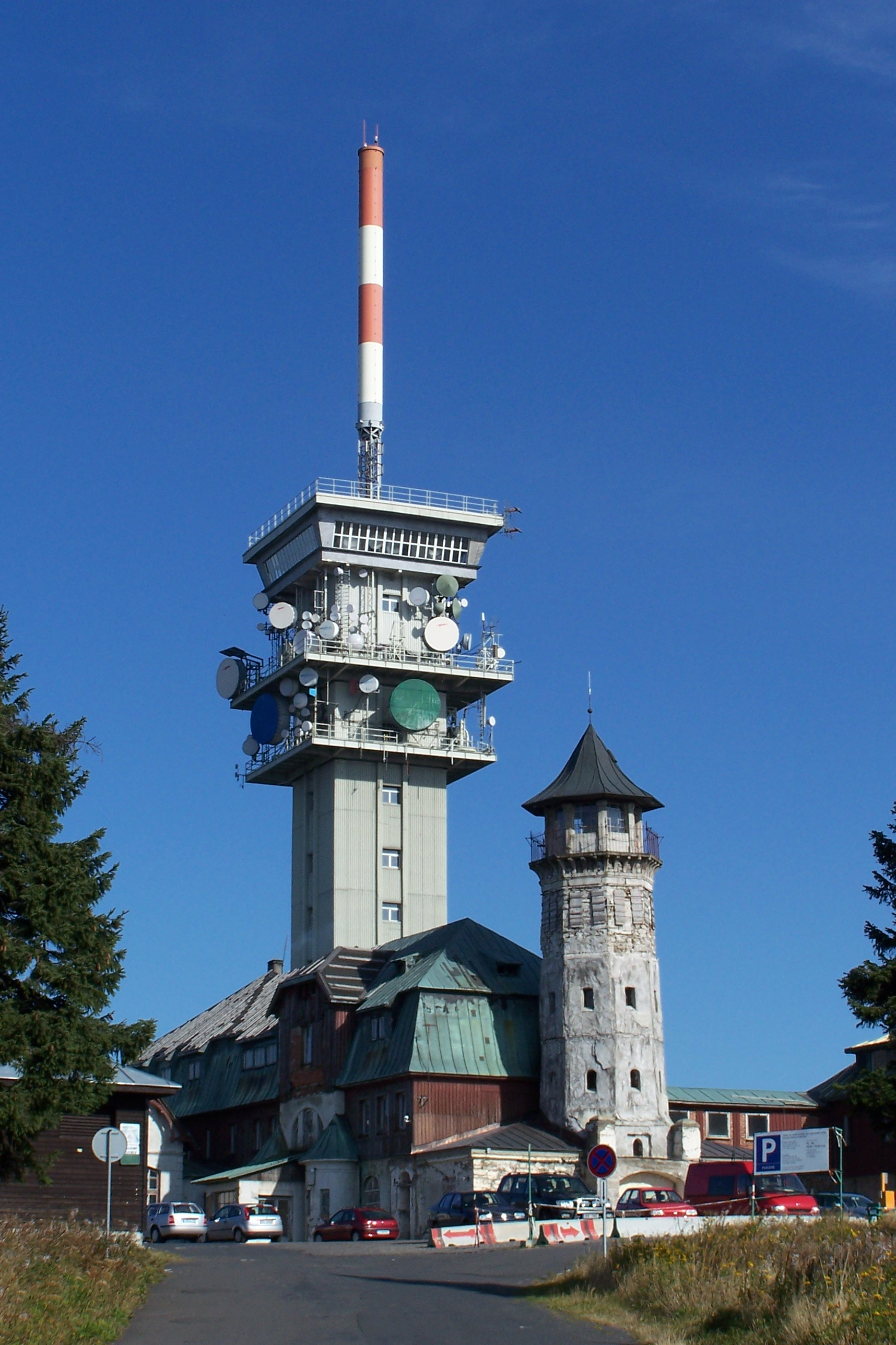 Klínovec, najwyższy szczyt Rudaw (Czechy)